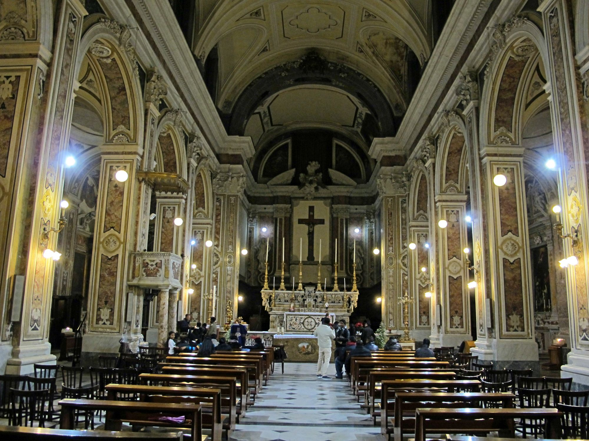 Napoli